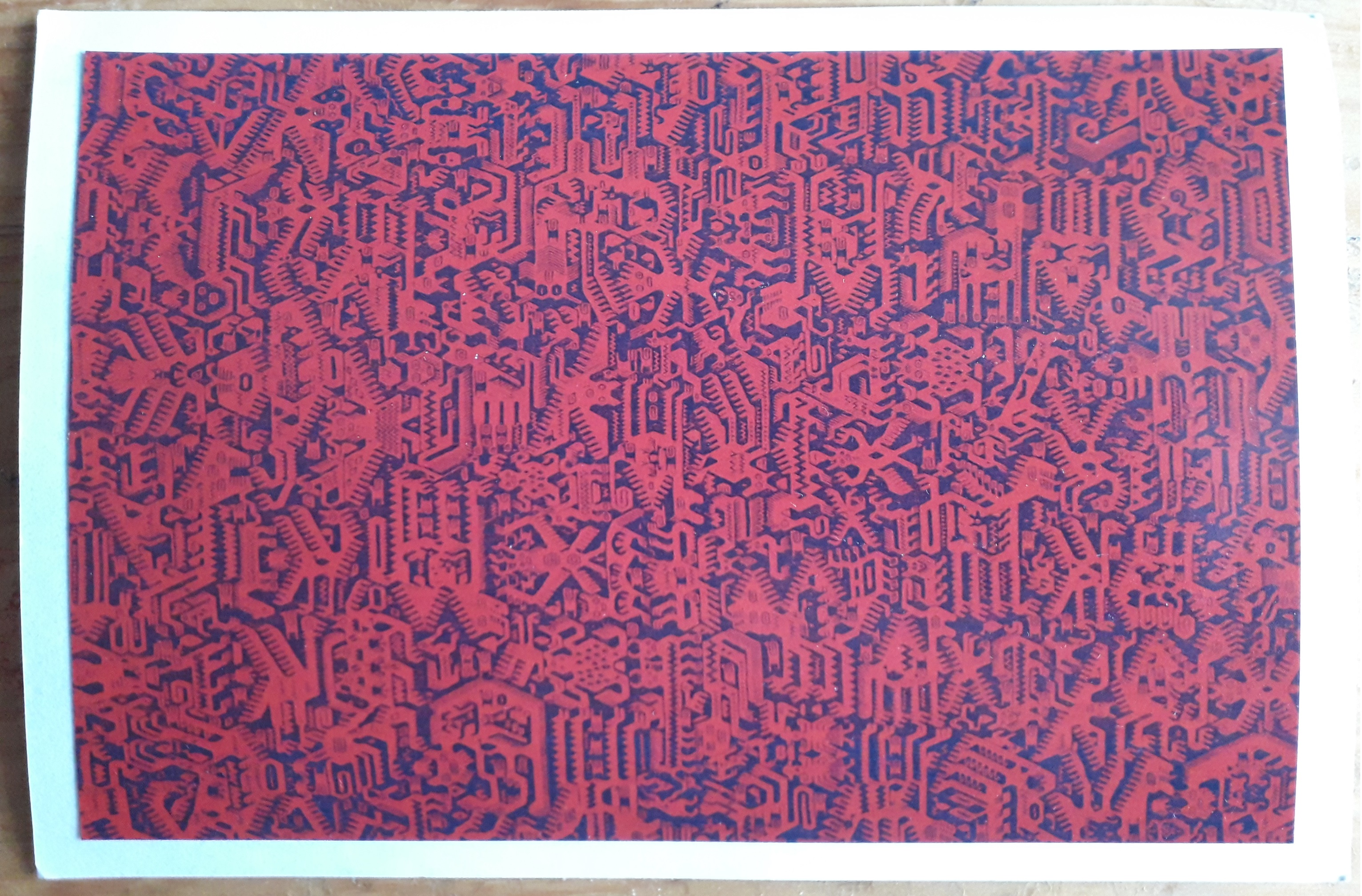 (textil femenino, Area cultural lalq’a, Chuquisava. Programa de renacimiento del arte Indígena, Sucre – Bolivia).